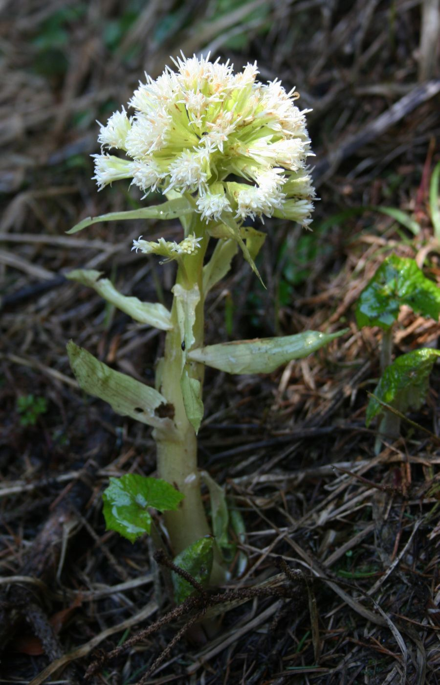 Weiße Pestwurz (Petasites albus), Korbblütler (Asteraceae) - Österreich/Austria/Autriche: Steiermark, Ennstaler Alpen, an der Forststraße zur Admonter Höhe SW St. Gallen